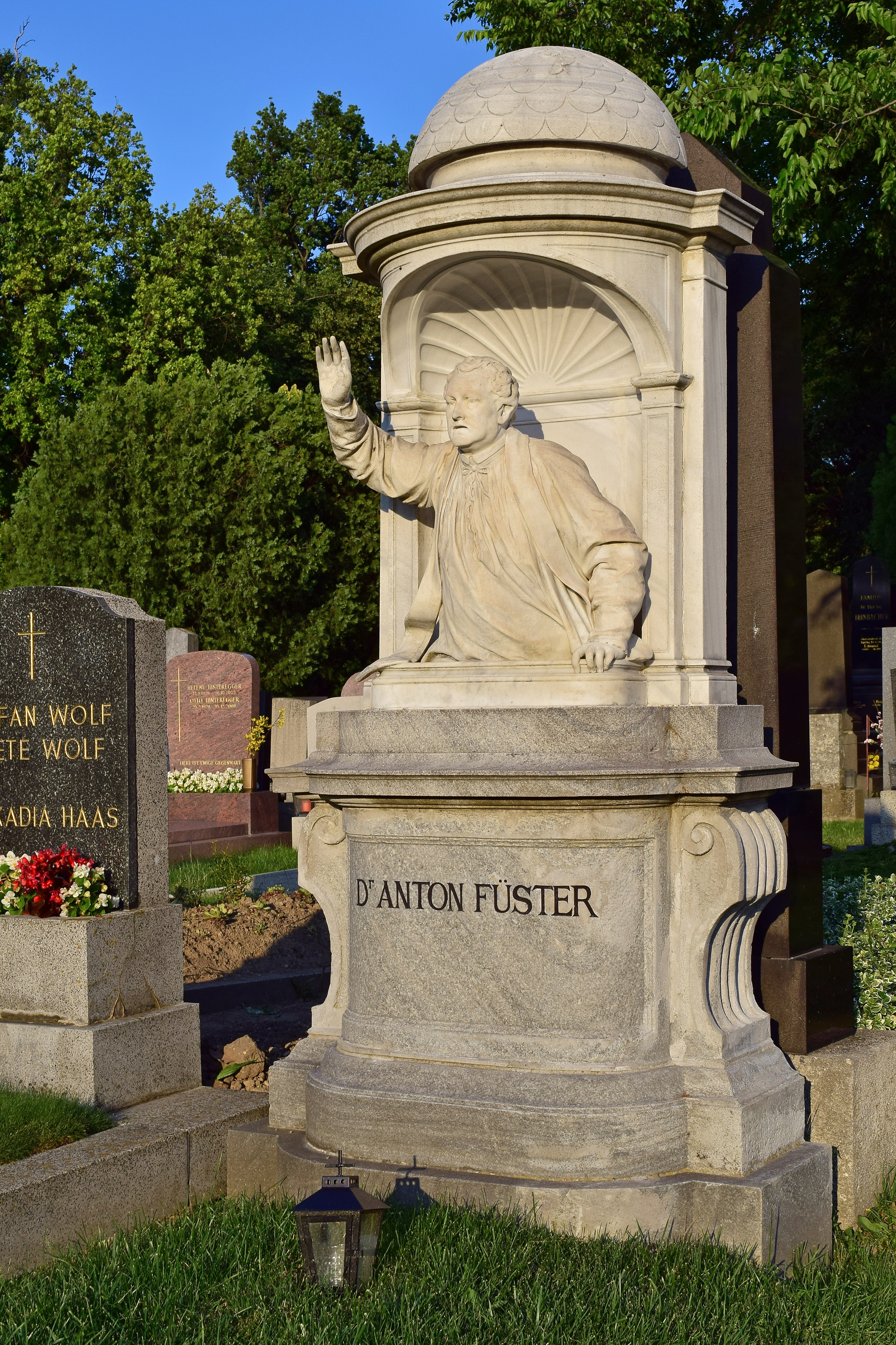 Ehrenhalber gewidmetes Grab von Anton Füster auf dem Wiener Zentralfriedhof, Gruppe 15 E, geschaffen von Bildhauer Josef Lax.